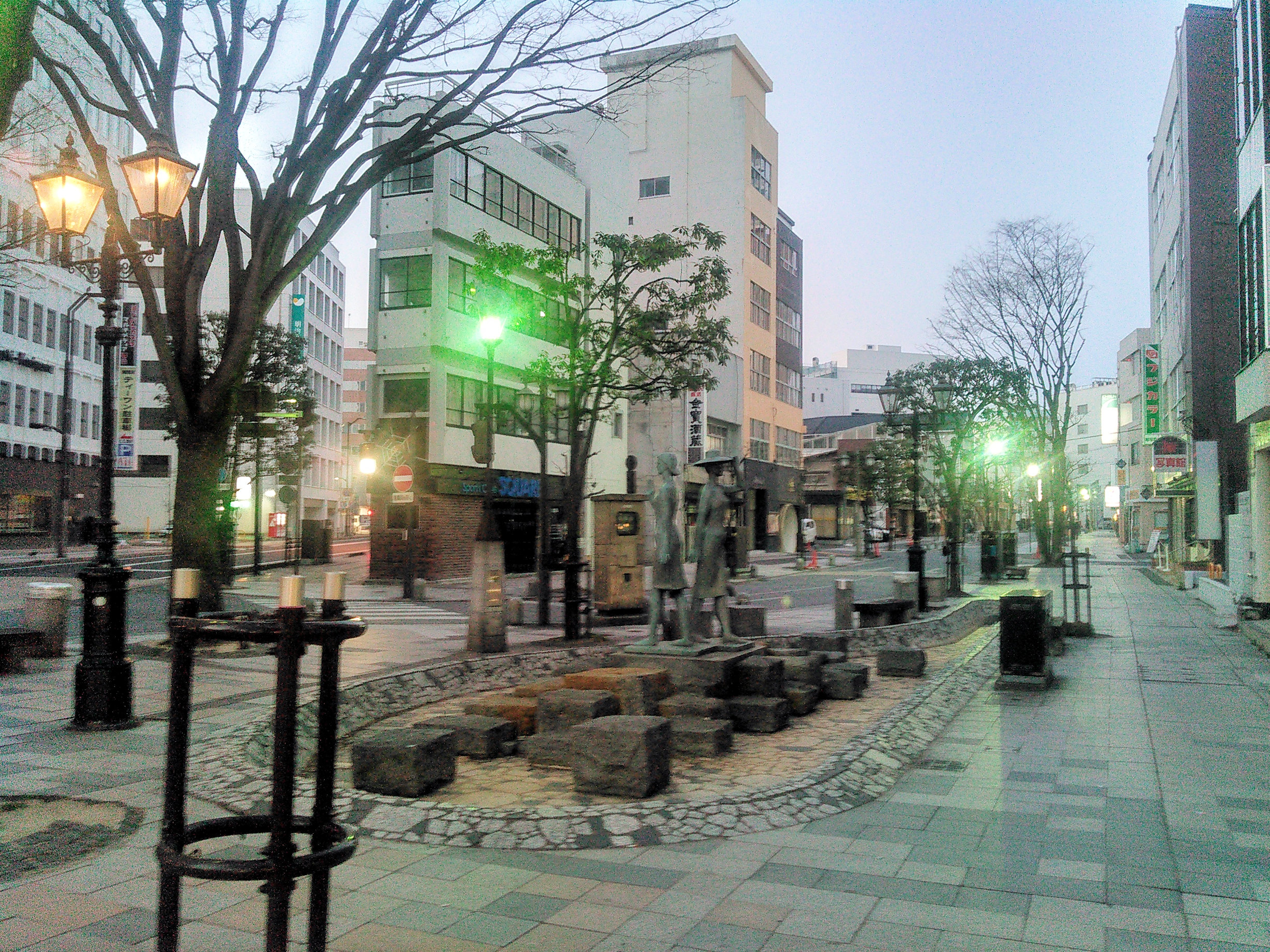 郡山市のフロンティア通り入口